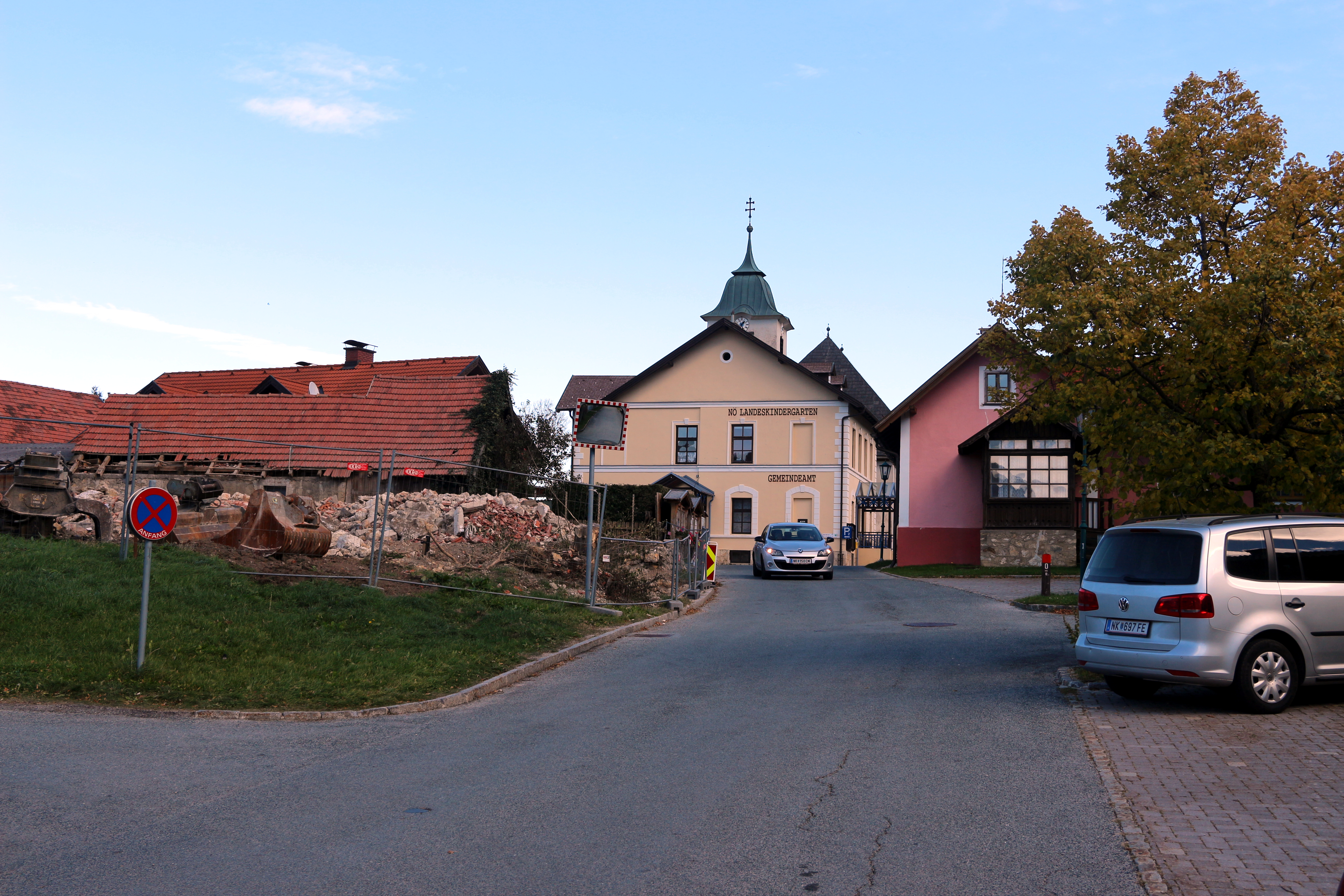 Ortsansicht von Raach am Hochgebirge, Niederöstereich.